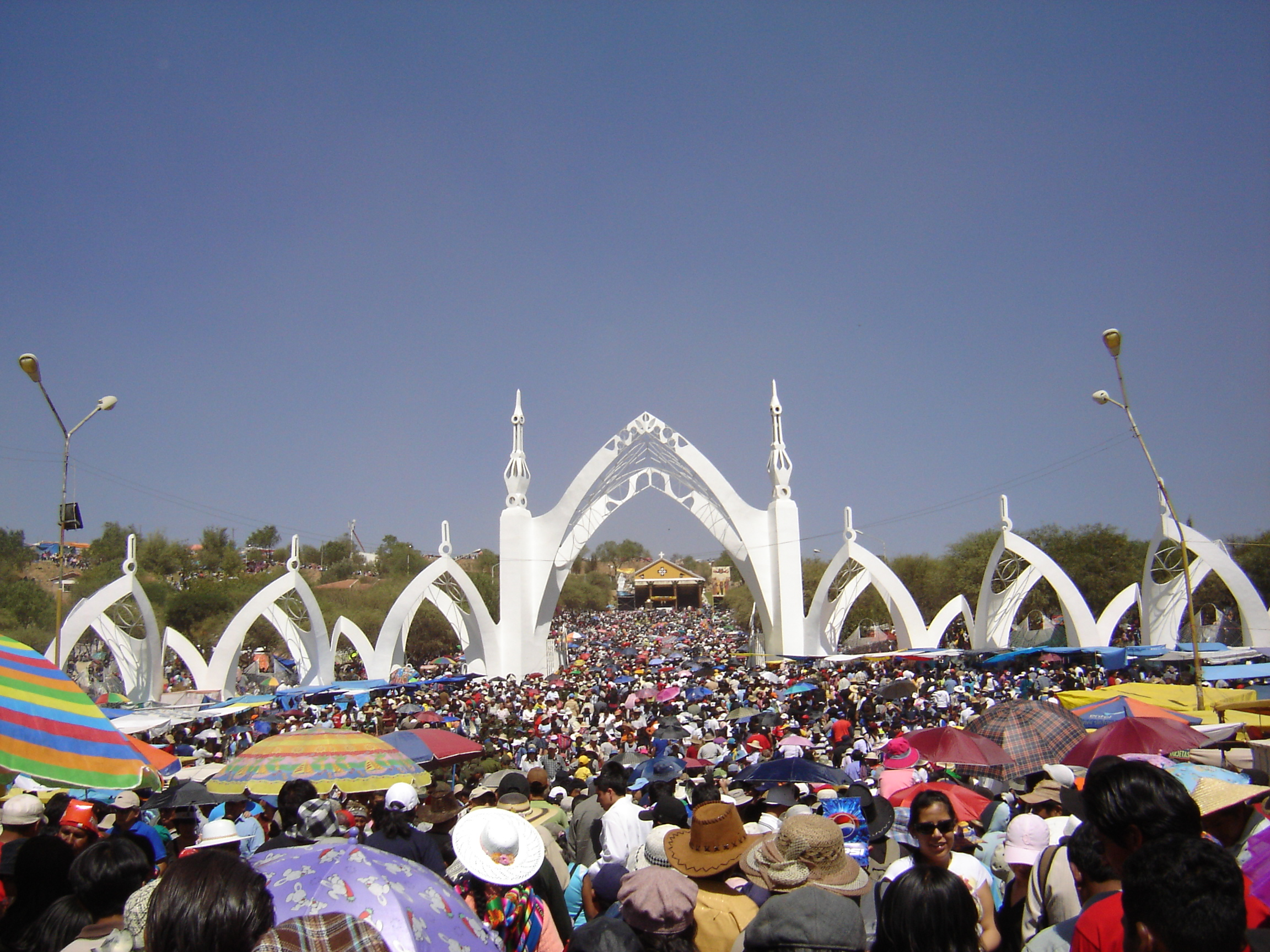 Devotos en peregrinación al Calvario de la Virgen María de Urqupiña el 16 de agosto de 2009. Runa Simi: Iñiqkuna purispa Urqupiñamanta Llump'aq Mariyaq Kalwariunman 16 p'unchaq chaqrayapuy killapi 2009 watapi.